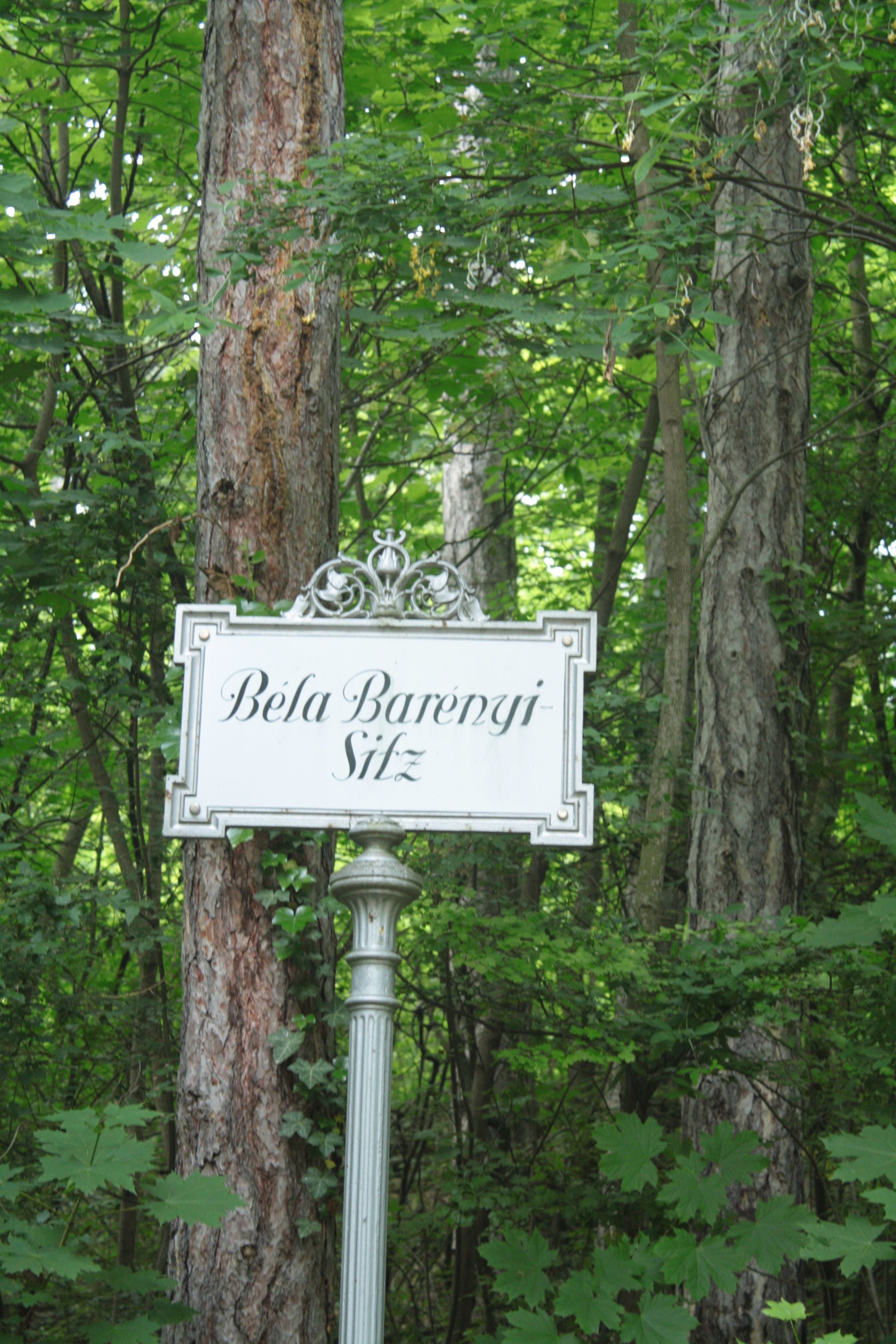 Kurpark von Baden (Niederösterreich) - Monument an Béla Barényi